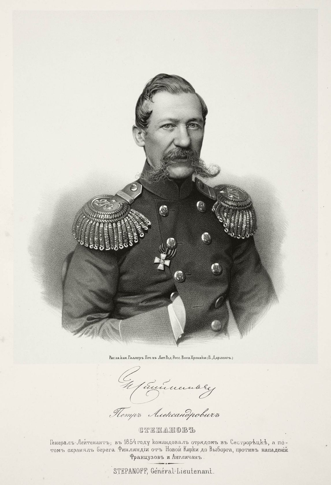 генерал-лейтенант Пётр Александрович Степанов